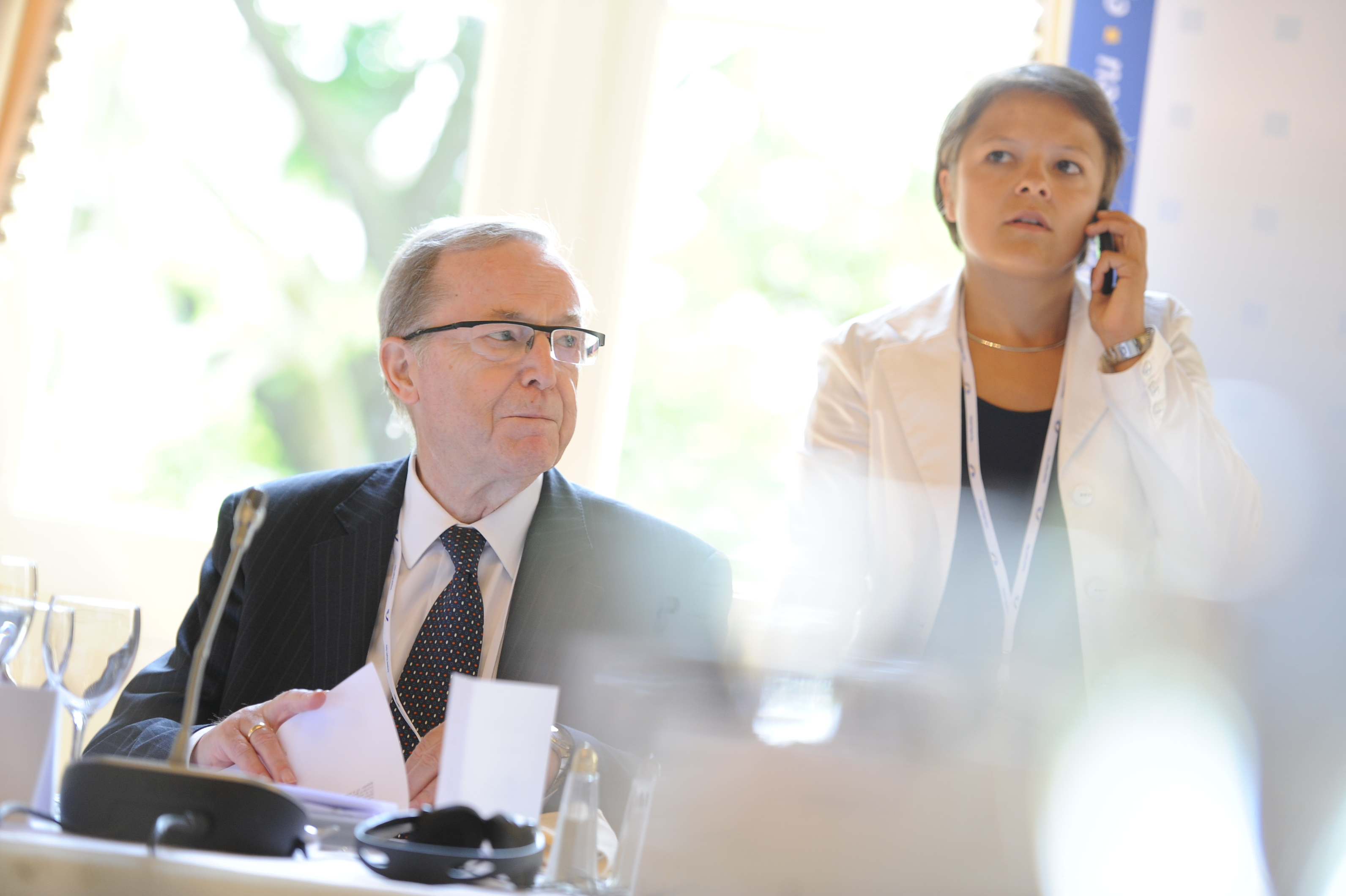 Wilfried Martens